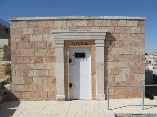 מבנה הקבר המשפחתי של הארי פישל בהר הזיתים